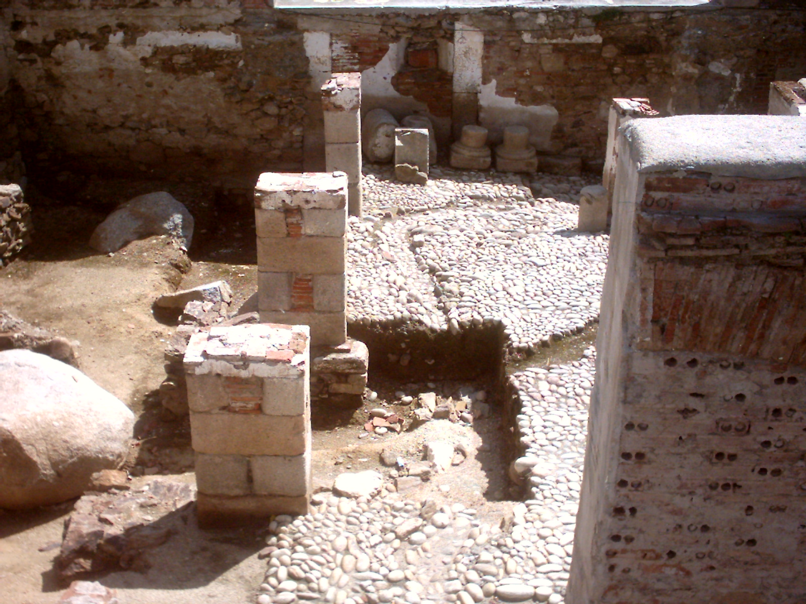 interior de la ermita de santo tome